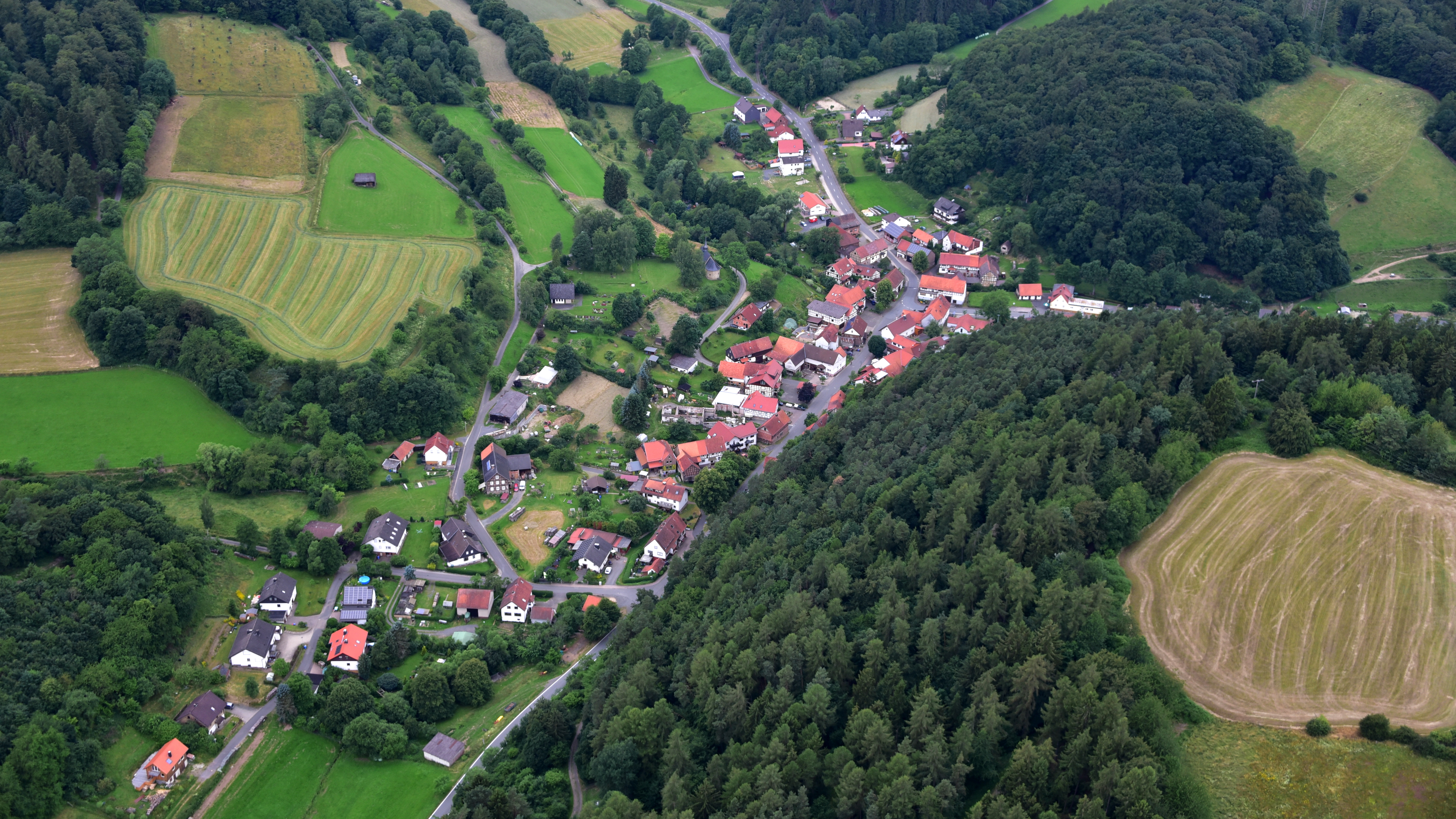 Frebershausen, Luftaufnahme (2016)